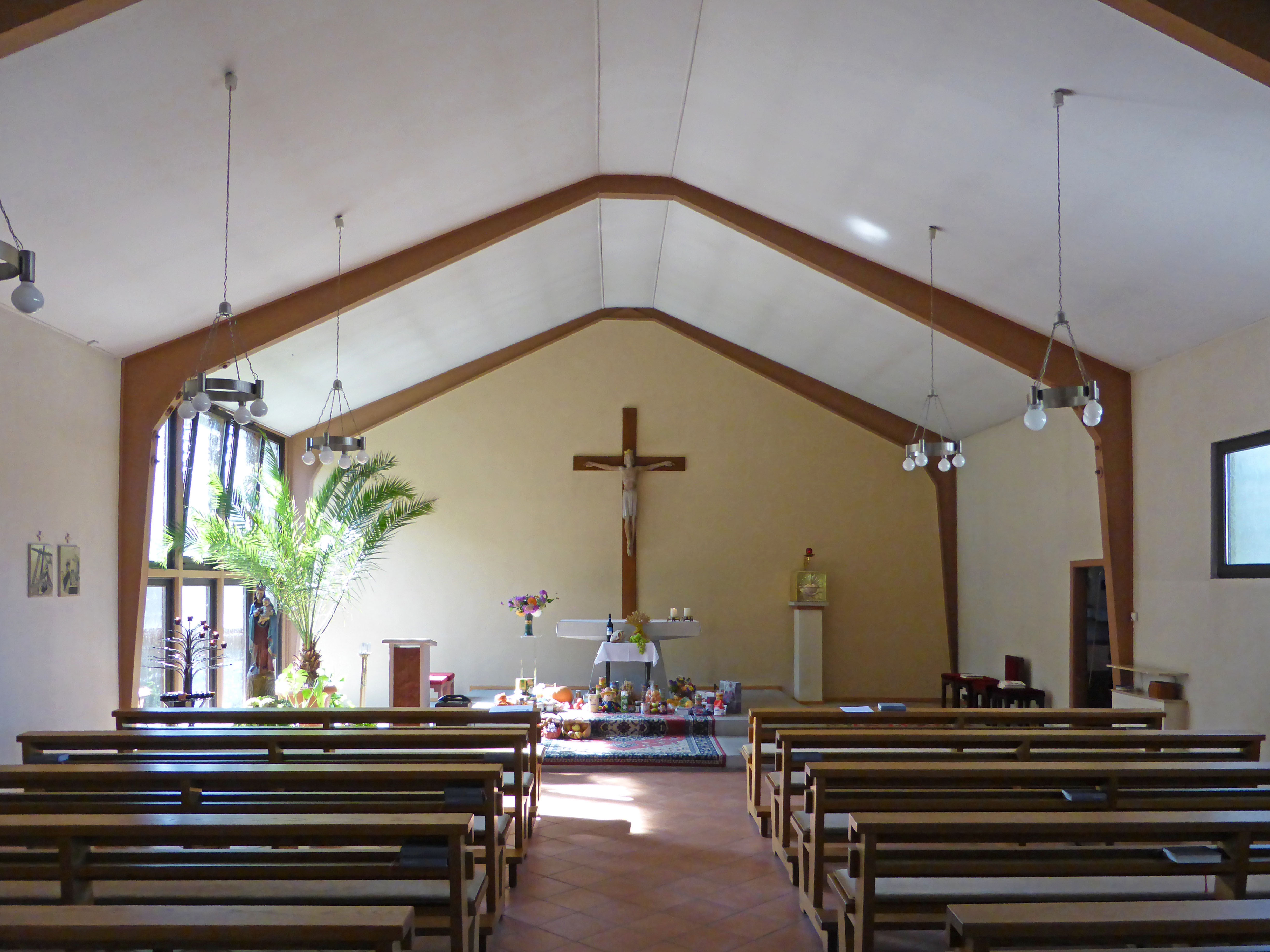 Katholische Kirche St. Josef in Steckelsdorf, Inneres.